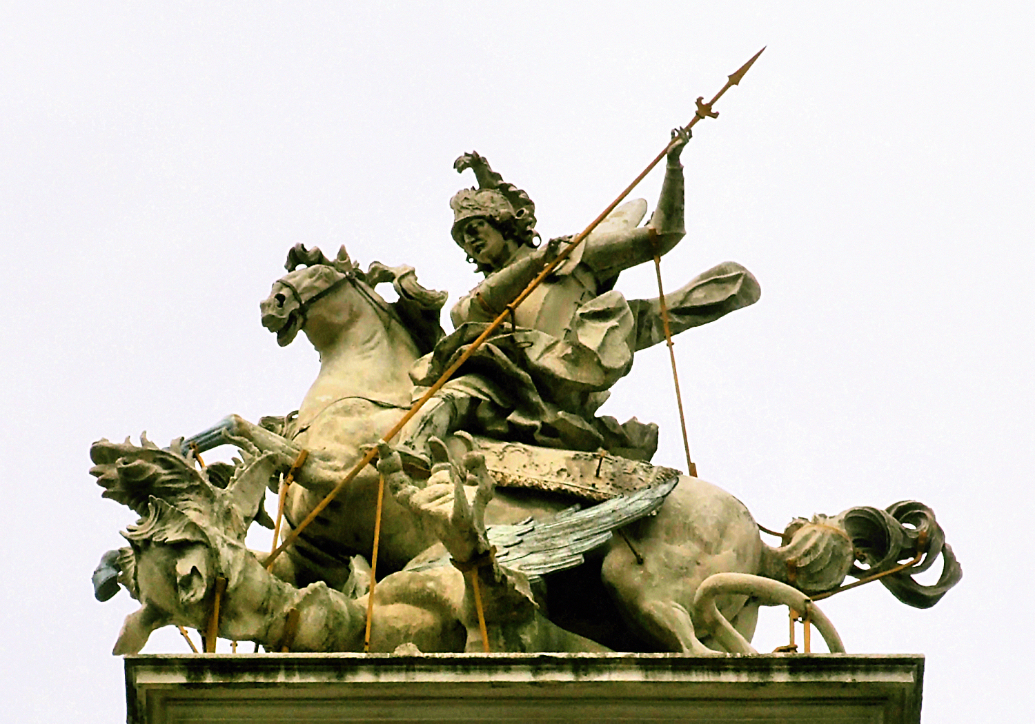 Lwów; Katedra greckokatolicka św. Jura (św. Jerzego): św. Jerzy (Lviv, Greek Catholic Catedral of St. George's: St. Georg)